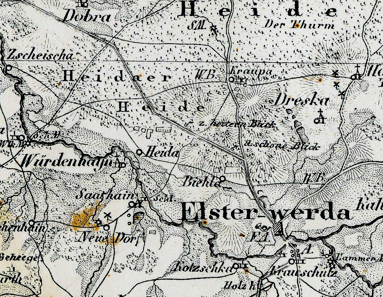 Lage der Gemeinde Heida und der Heidaer Heide im Kreis Liebenwerda